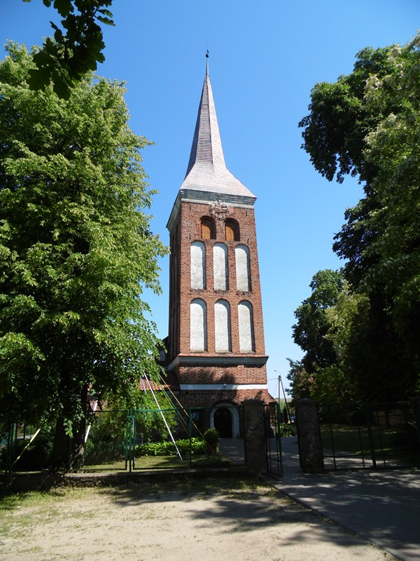 KOŚCIÓŁ.